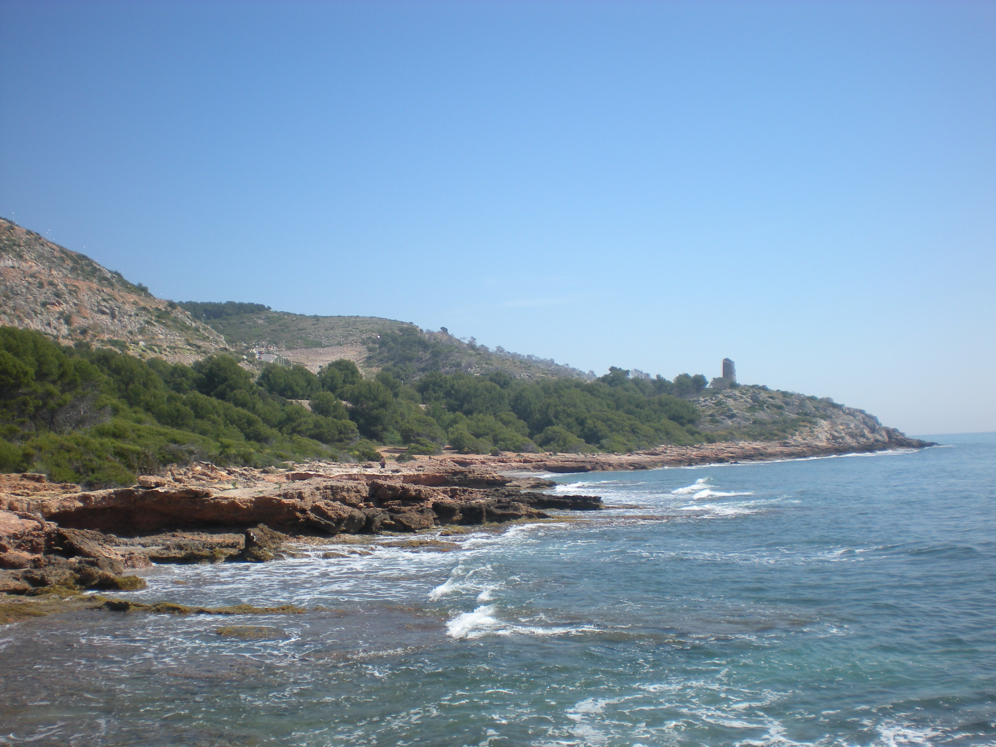 Vista de la playa de la Renegà (Oropesa del Mar, Castellón, España)